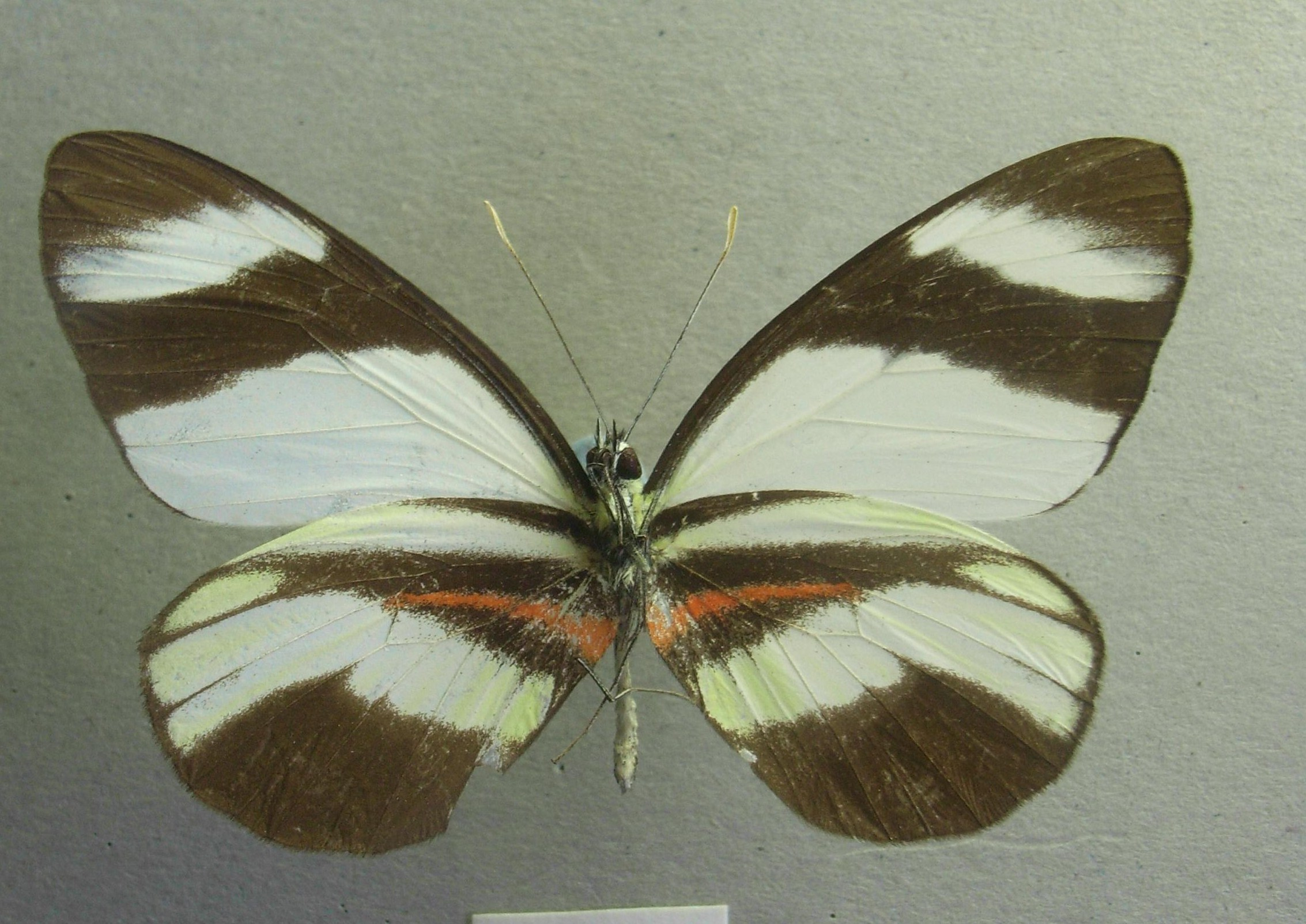 Perrhybris pamela (Stoll, 1870) (syn: Perrhybris pyrrha), (Lepidoptera: Pieridae)